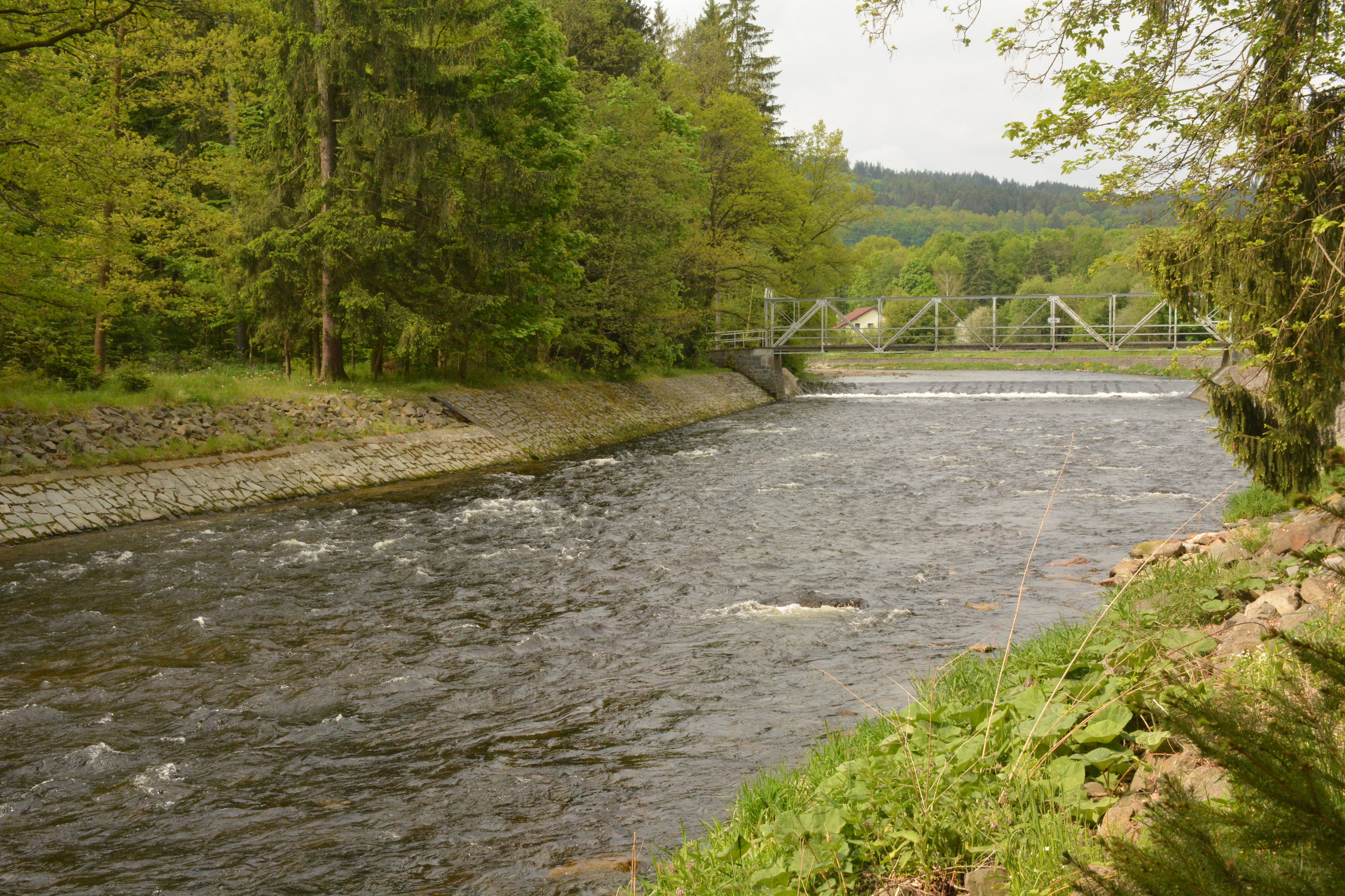 Most přes řeku Otavu a jez na Pátečku u Sušice (Šumava)